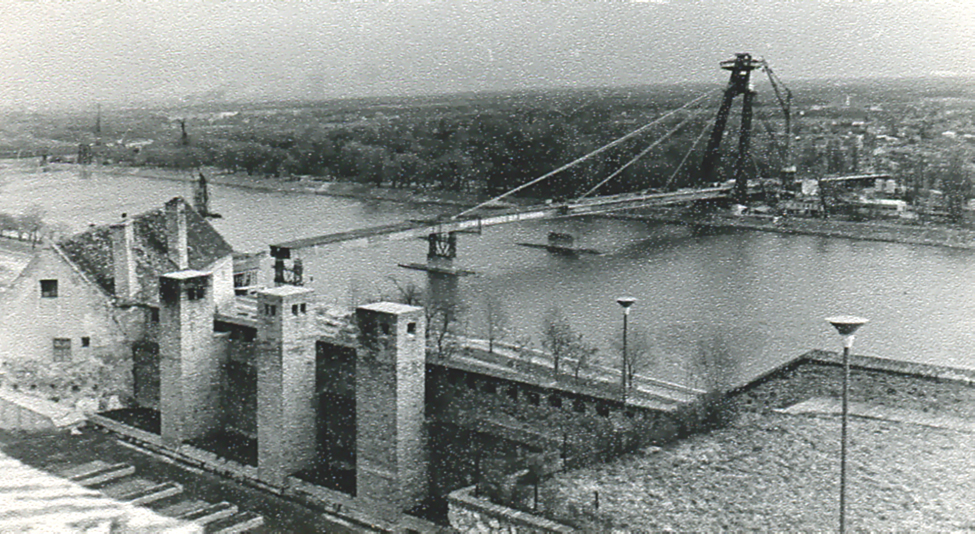 Danube_bridge.Bratislava